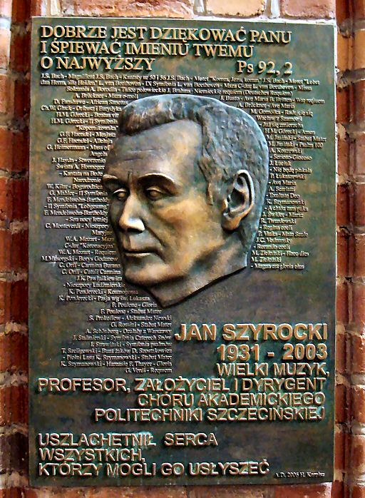 Szczecin Katedra św. Jakuba